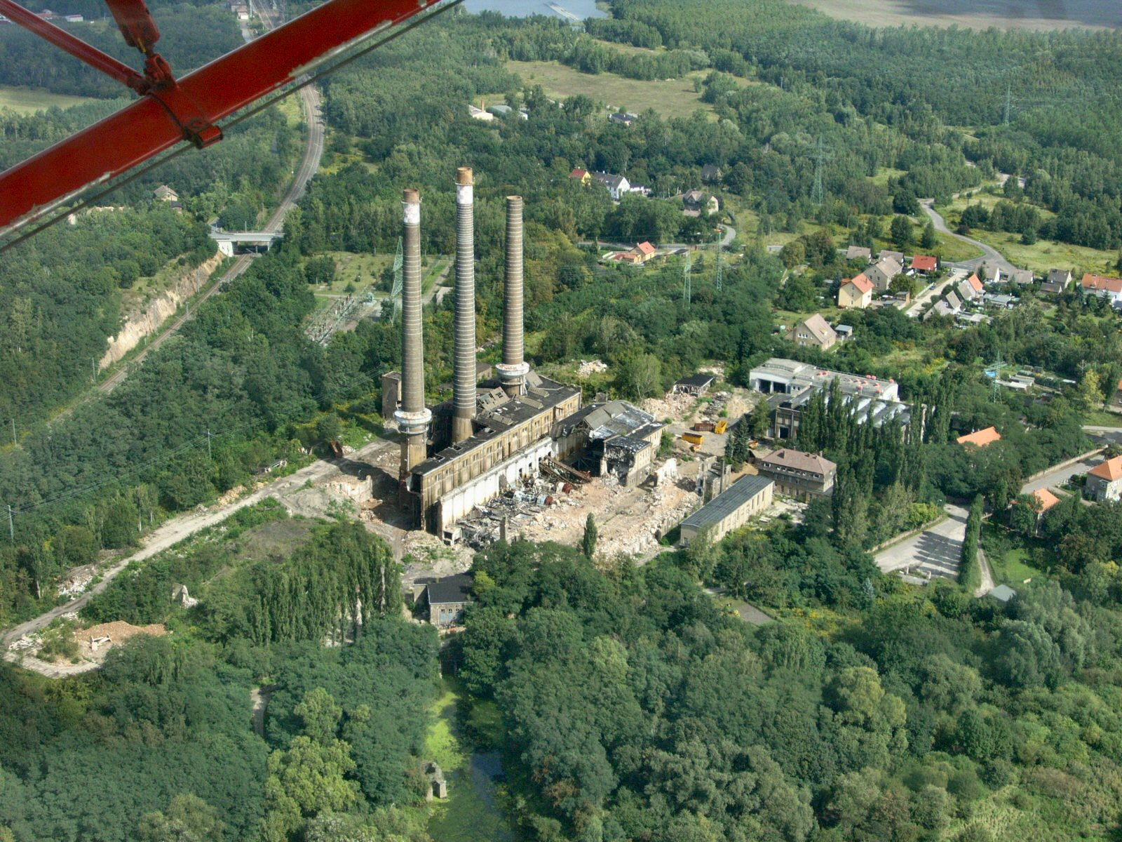 Bahnkraftwerk Muldenstein